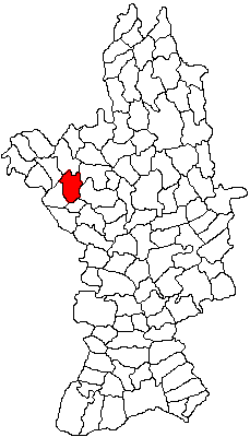 Categorie:Hărţi ale judeţului Olt